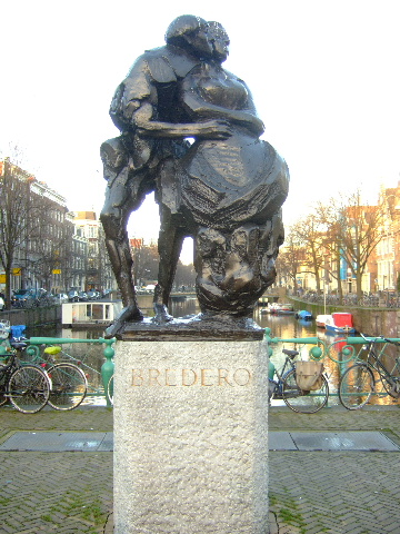 Piet Esser: Gerbrand Bredero-Denkmal (1968) in Amsterdam